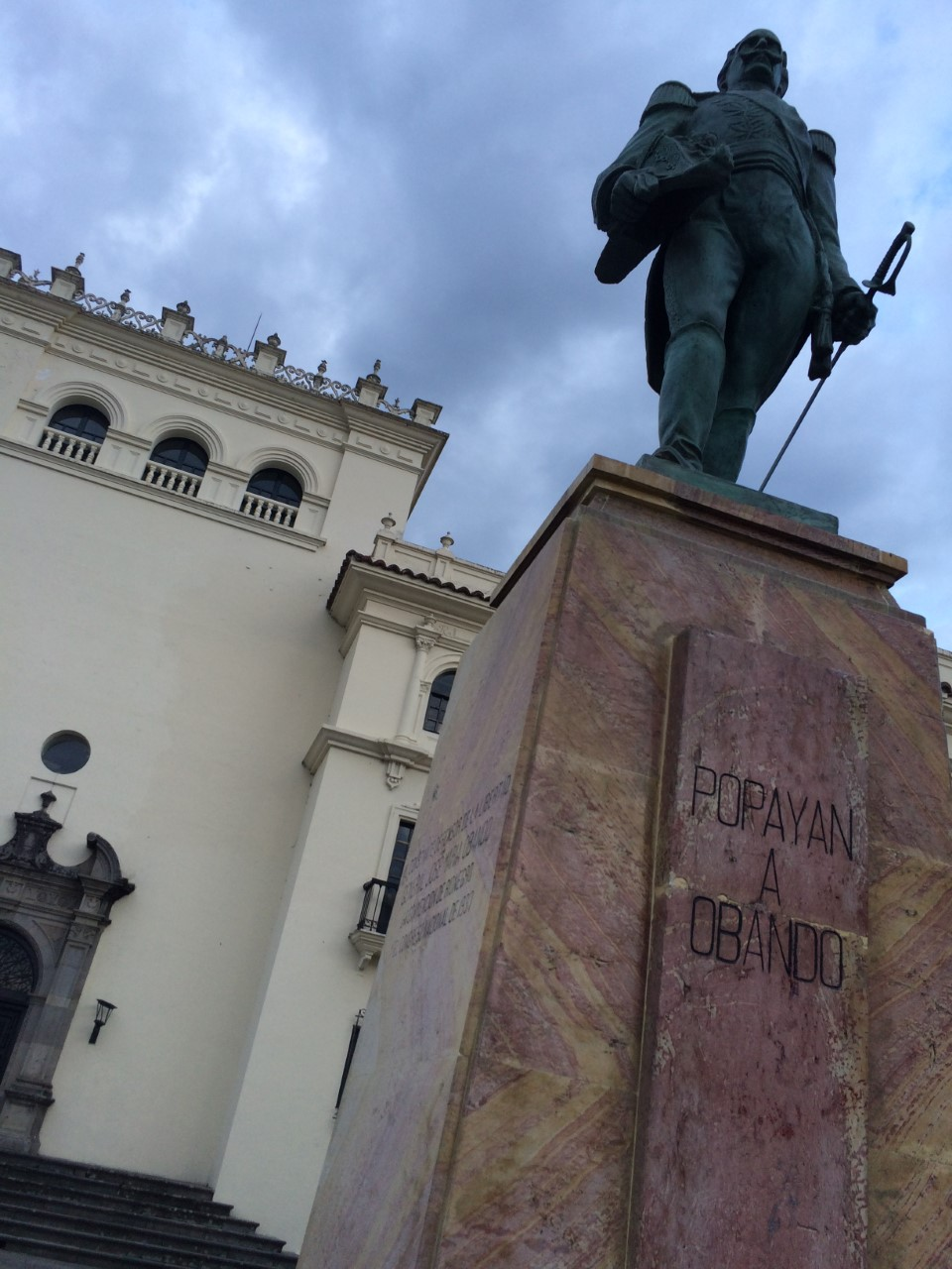 Monumento al General José María Obando en Popayán